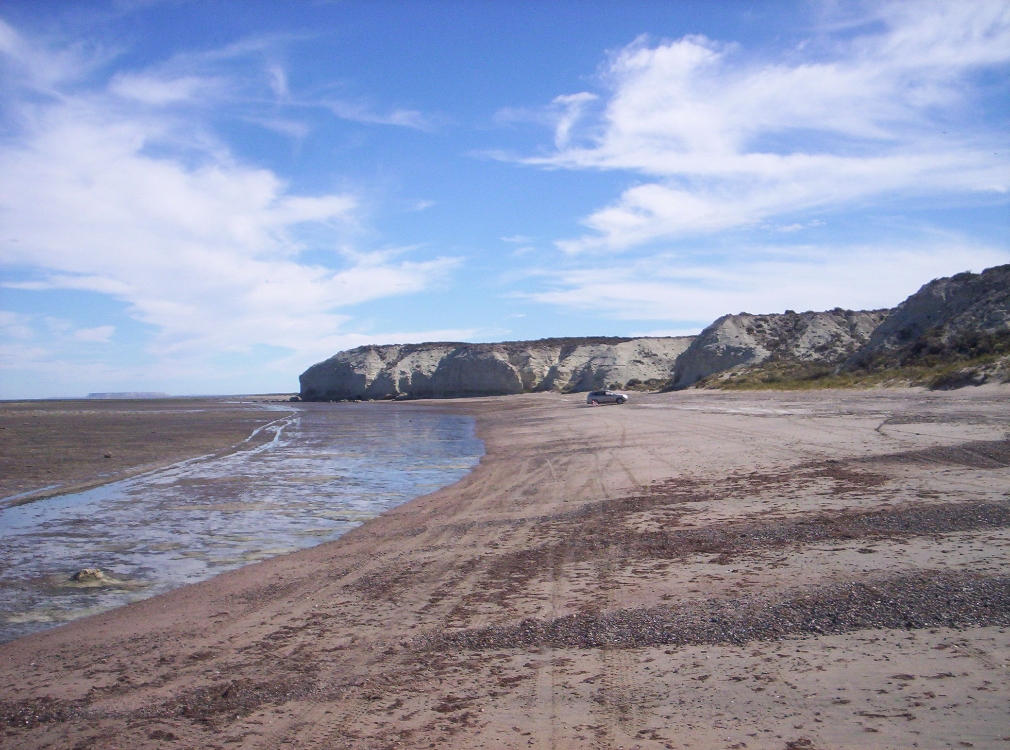 playa en las afueras de las grutas